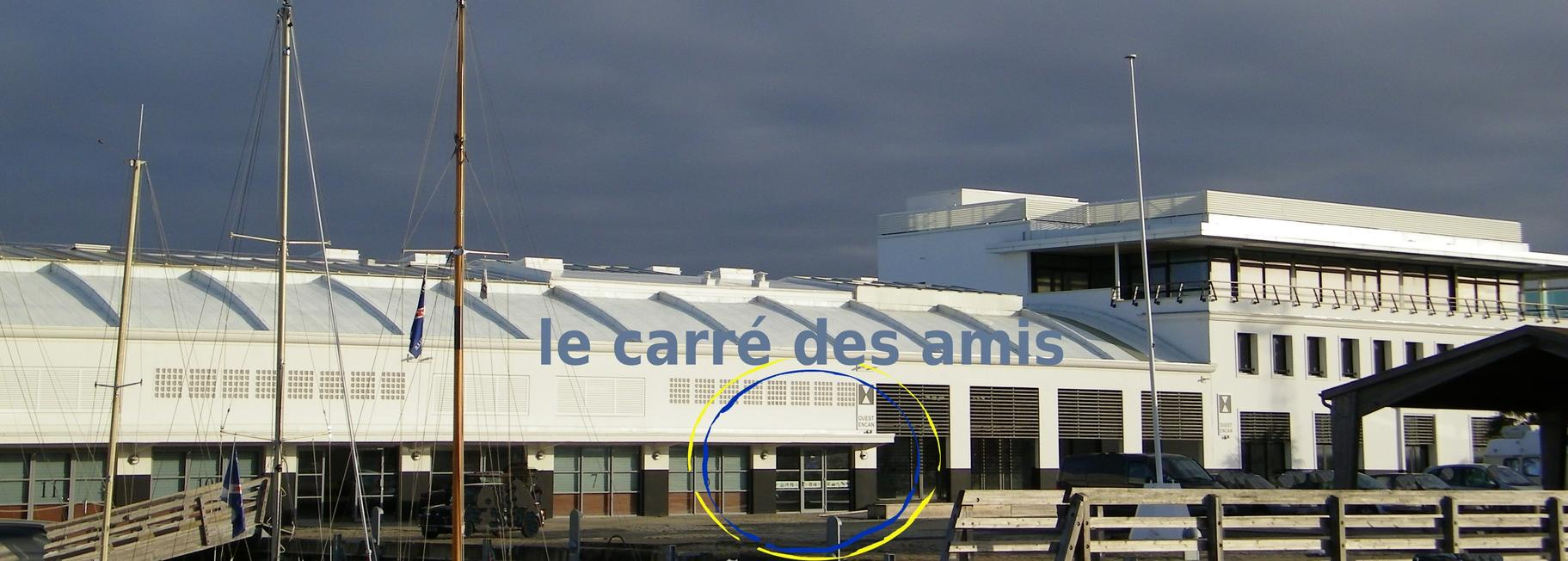 Le Carré de l'association AAMMLR dans les bâtiments de l'Encan à La Rochelle